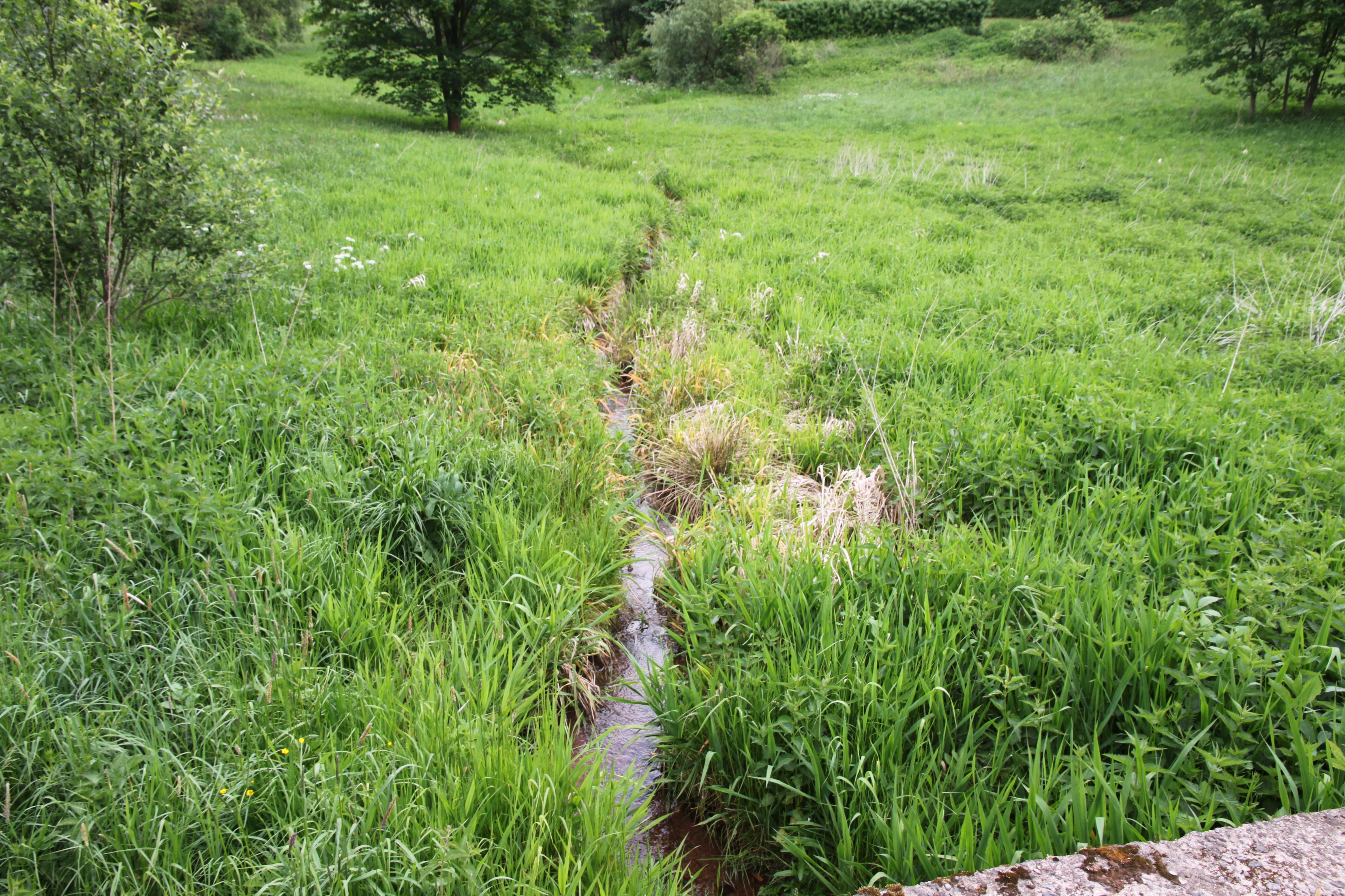 Kravský potok nedaleko od pramene, Janovičky, okres Náchod.